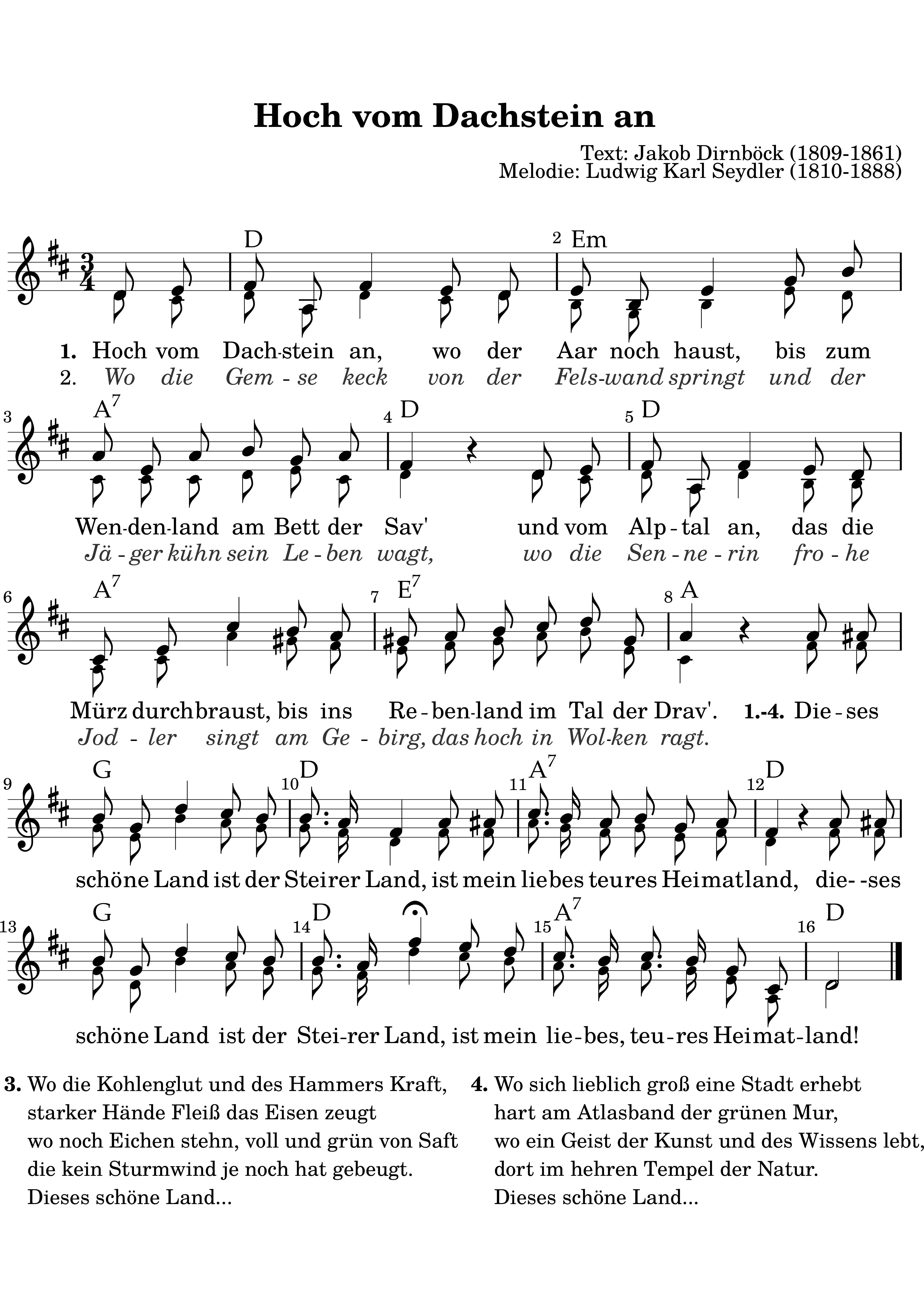 Das Dachsteinlied, Steirsche Landeshymne